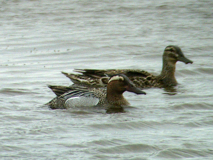 Årta / Garganey Anas querquedula, male & female. Halmstad, Sweden.